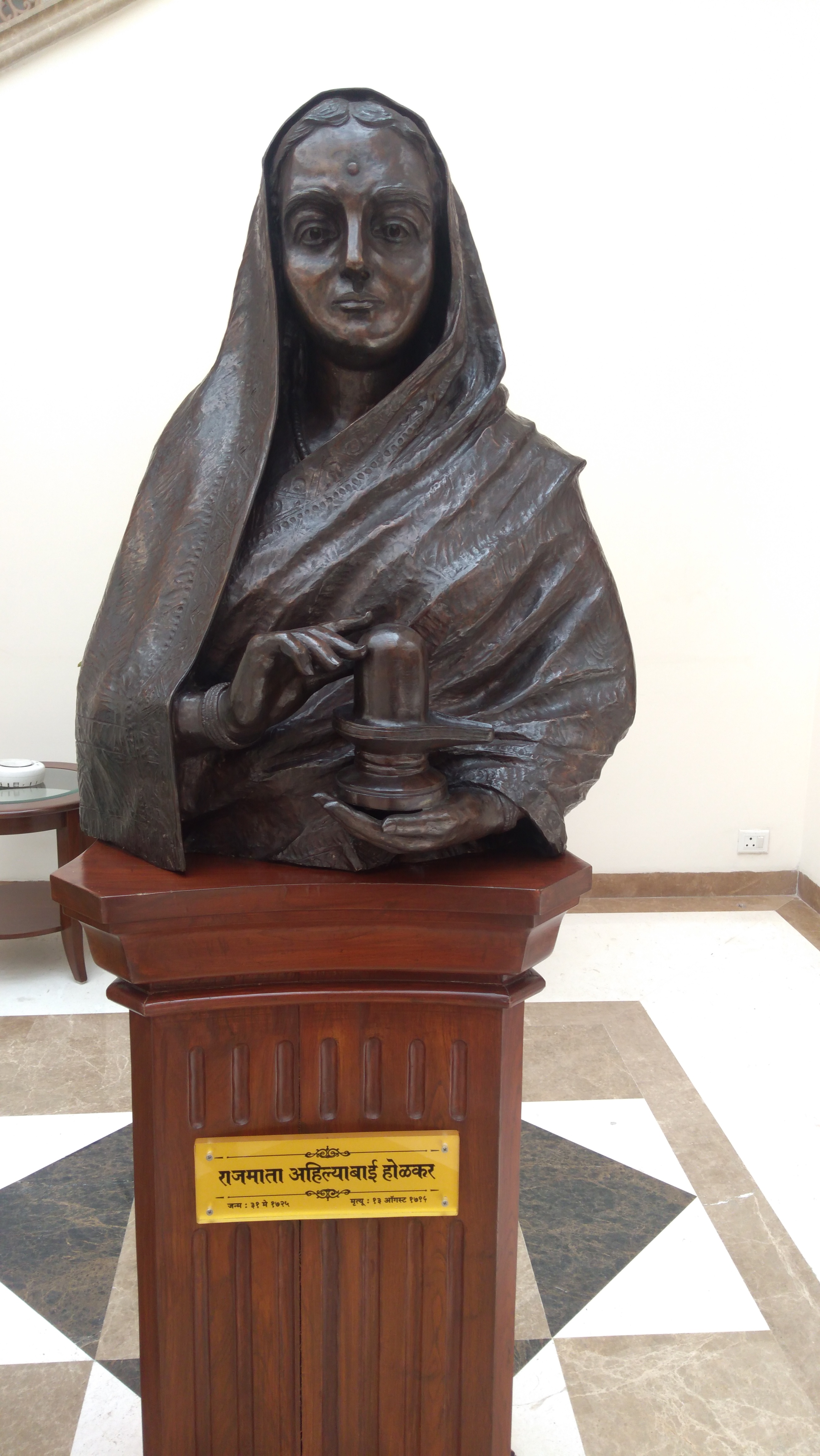 Maharani Ahilyabai Holkar statue, Maharashtra sadan, New Delhi